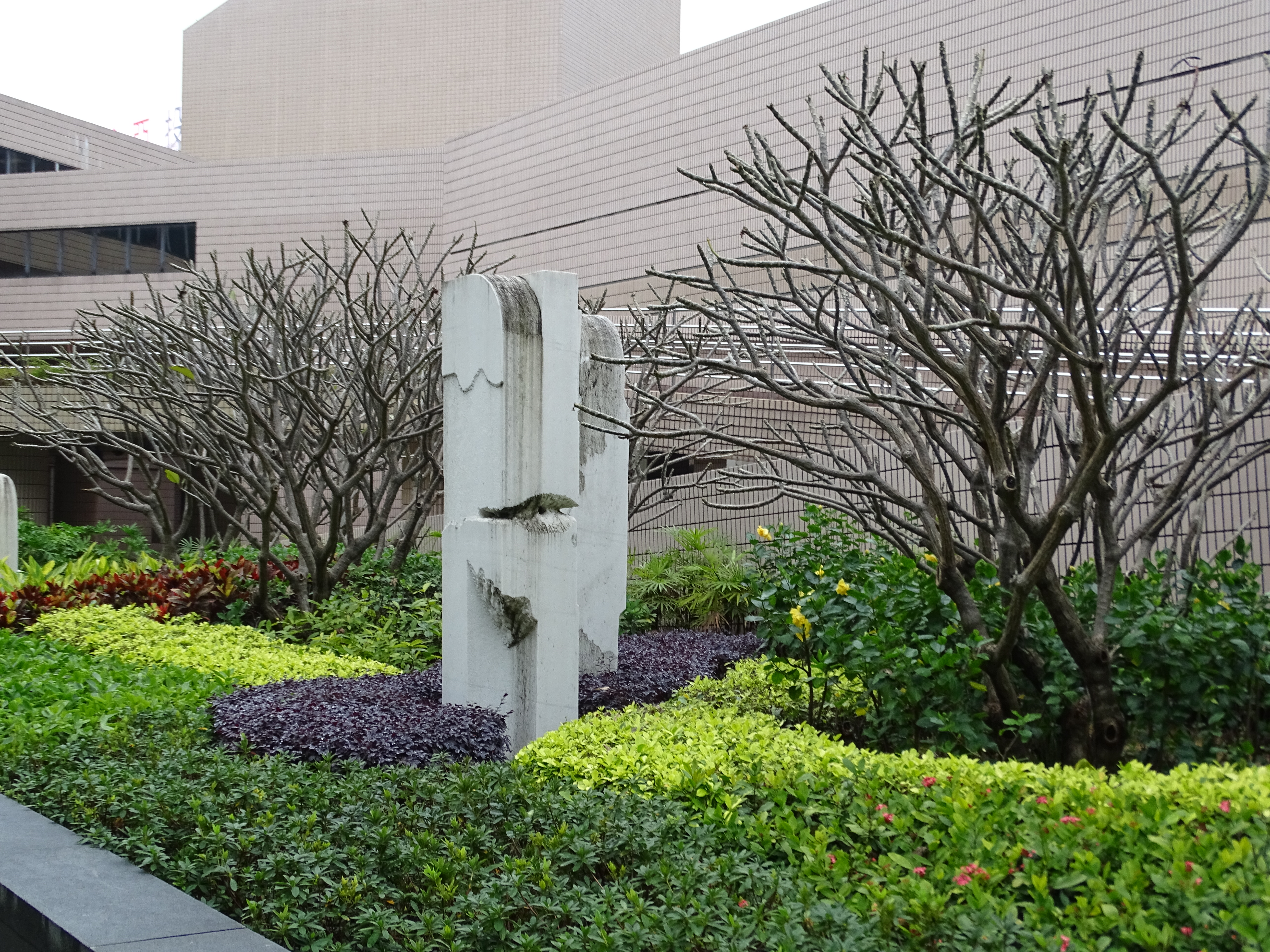 Kunst unter freiem Himmel, Art Square at Salisbury Garden / Hong Kong Cultural Centre Complex HKCCC, im Hintergrund das Hong Kong Space Museum (Hall of Astronomy), Kowloon, Hong Kong